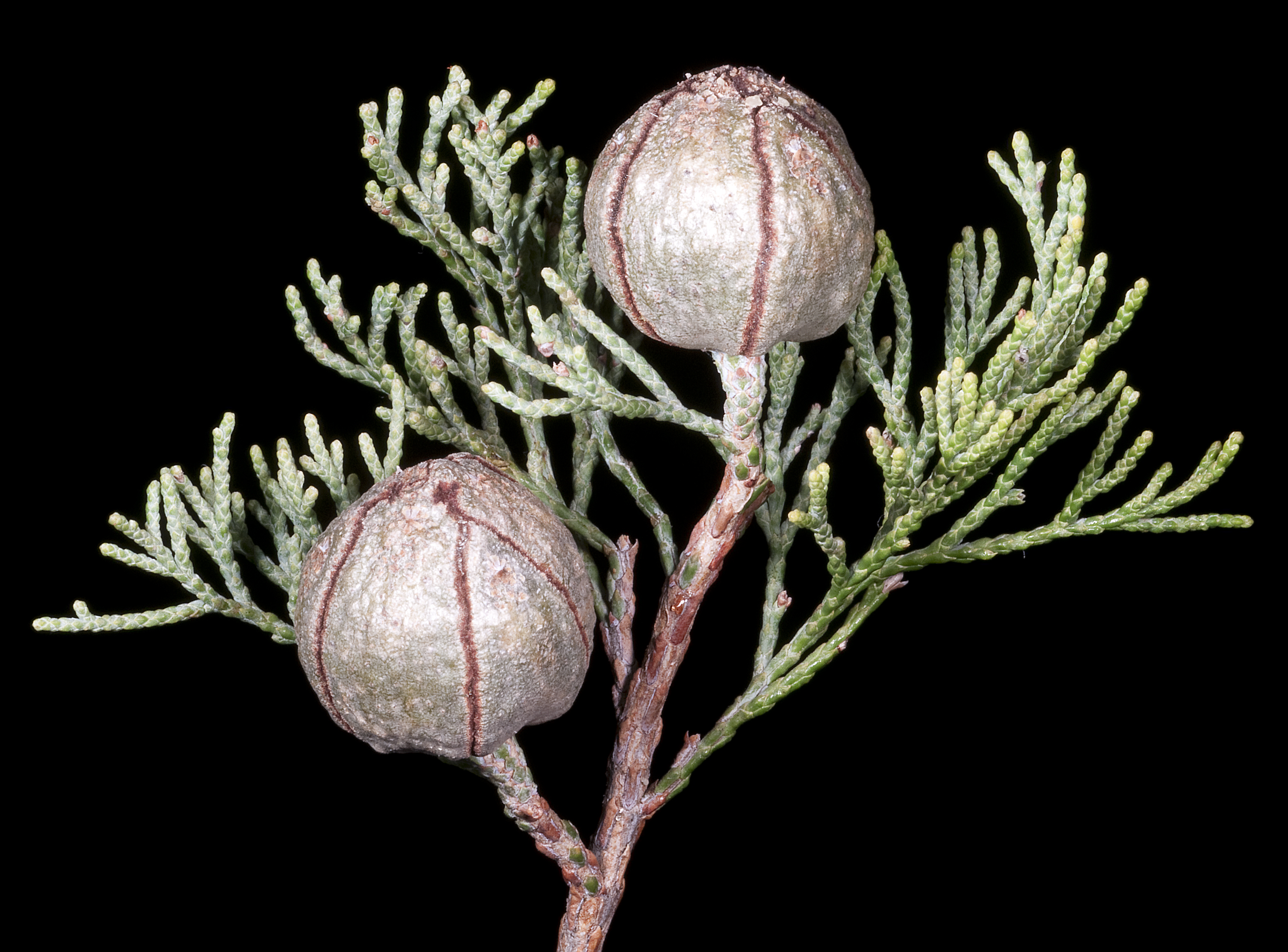 KRT4165